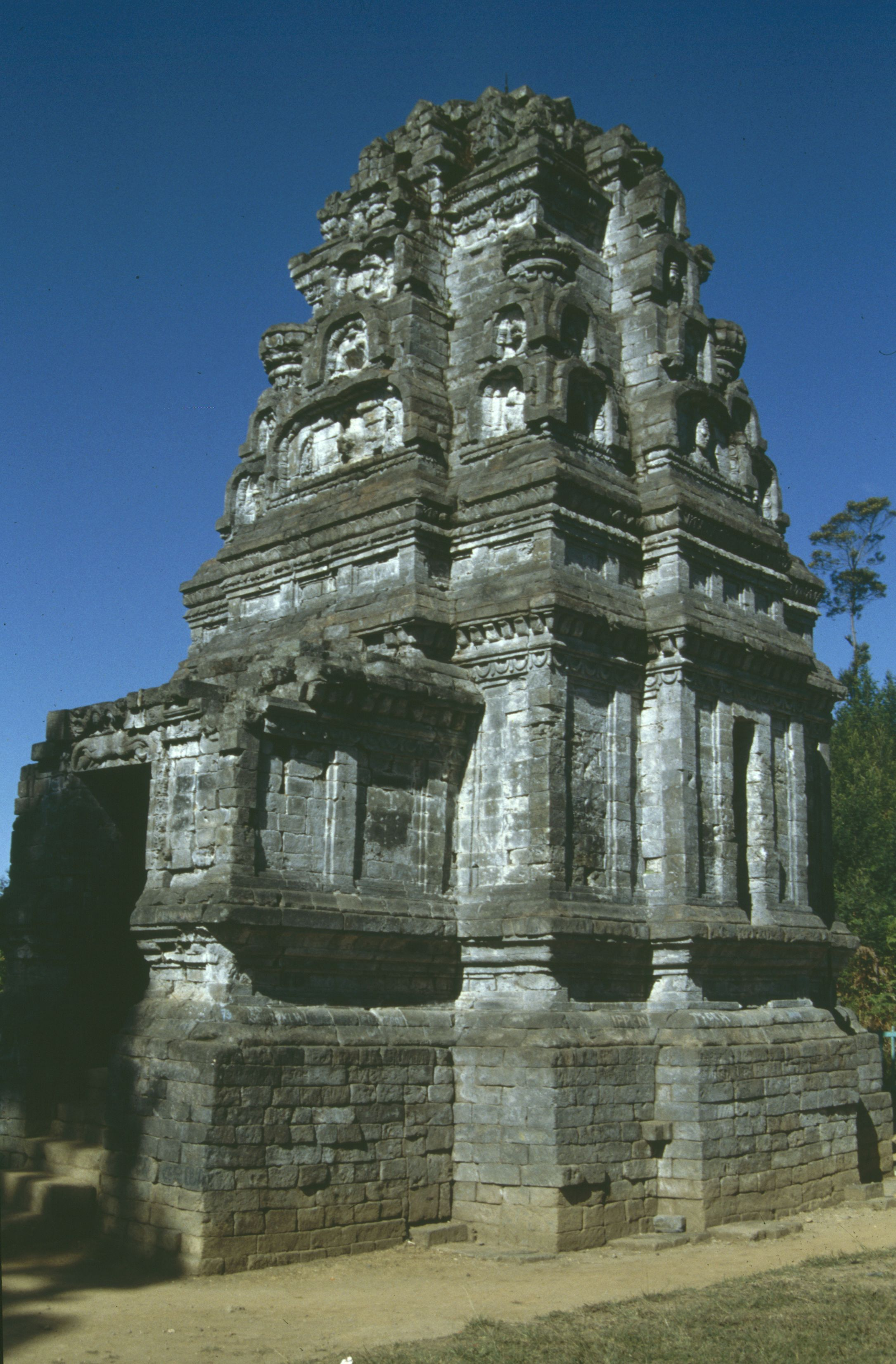 Dieng Plateau: Candi Bima